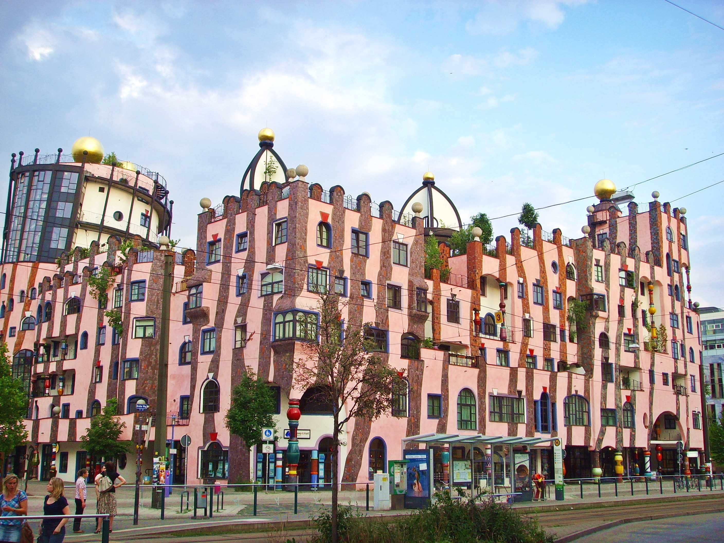 Grüne Zitadelle in Magdeburg